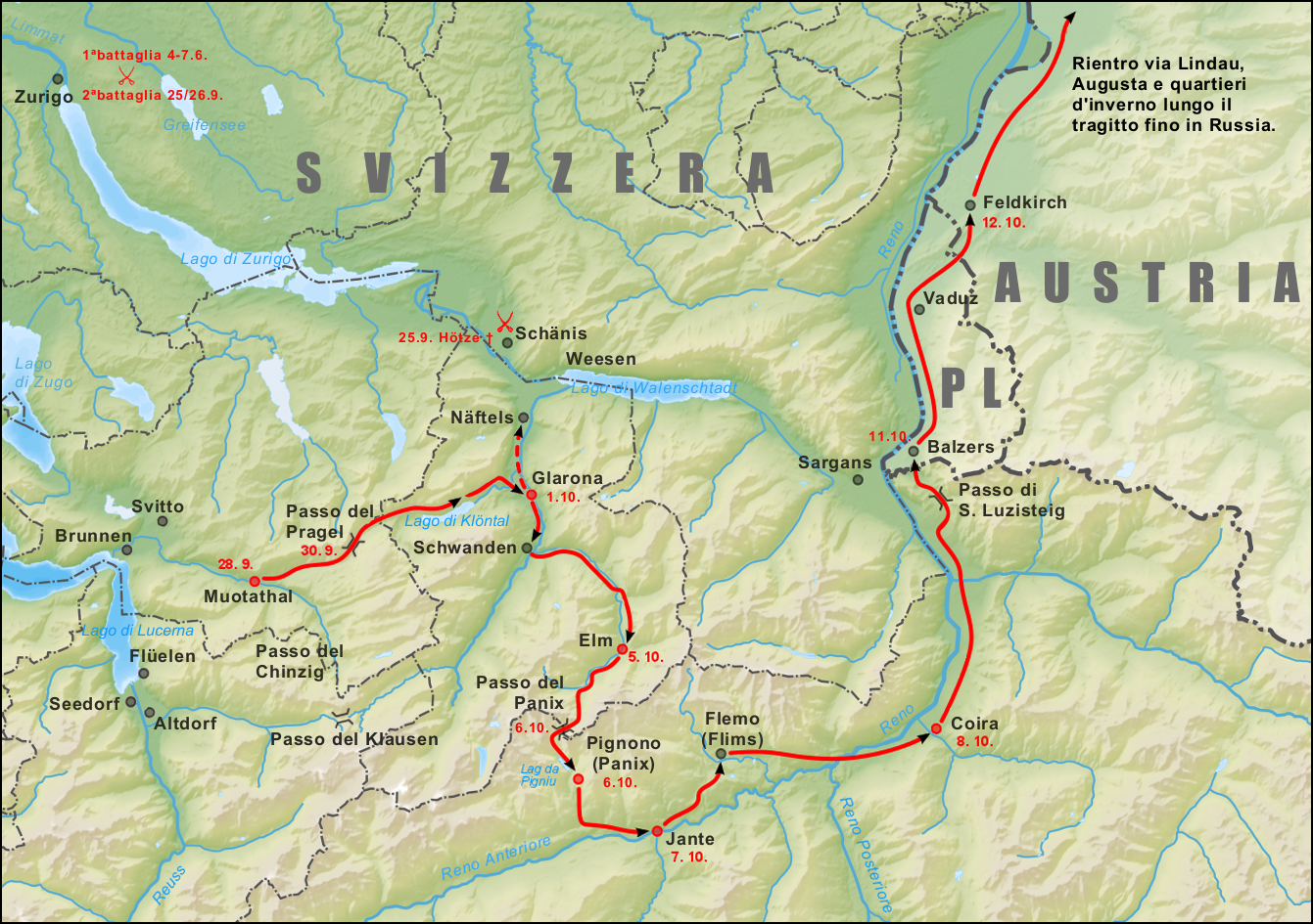 Percorso da Muotathal ai quartieri in Baviera dell'armata russo-austriaca sotto il comando di Alexandre Souvorov nel 1799, nell'ambito della Guerra della seconda coalizione durante la campagna in Svizzera . Datazione del calendario gregoriano.